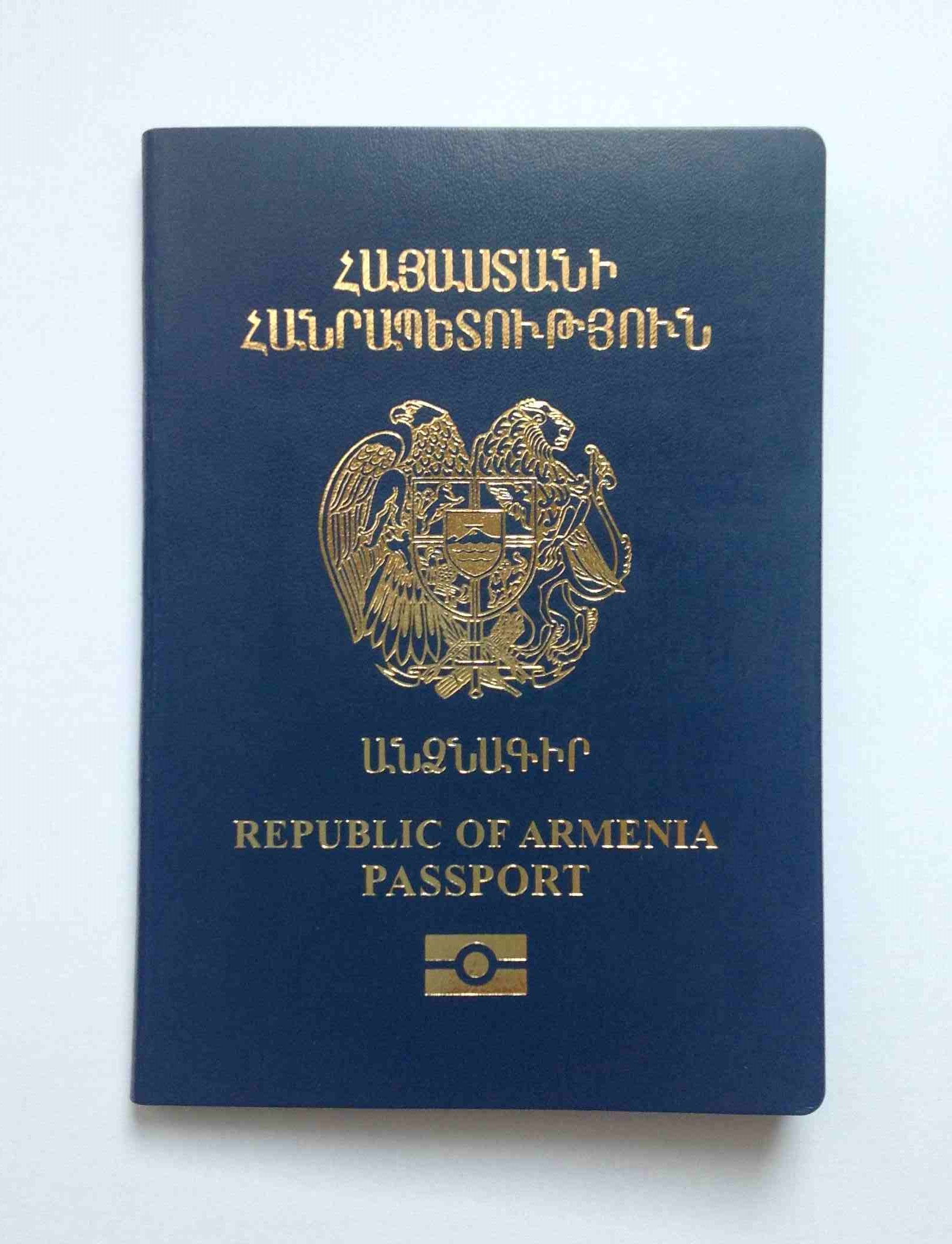 Armenian passport